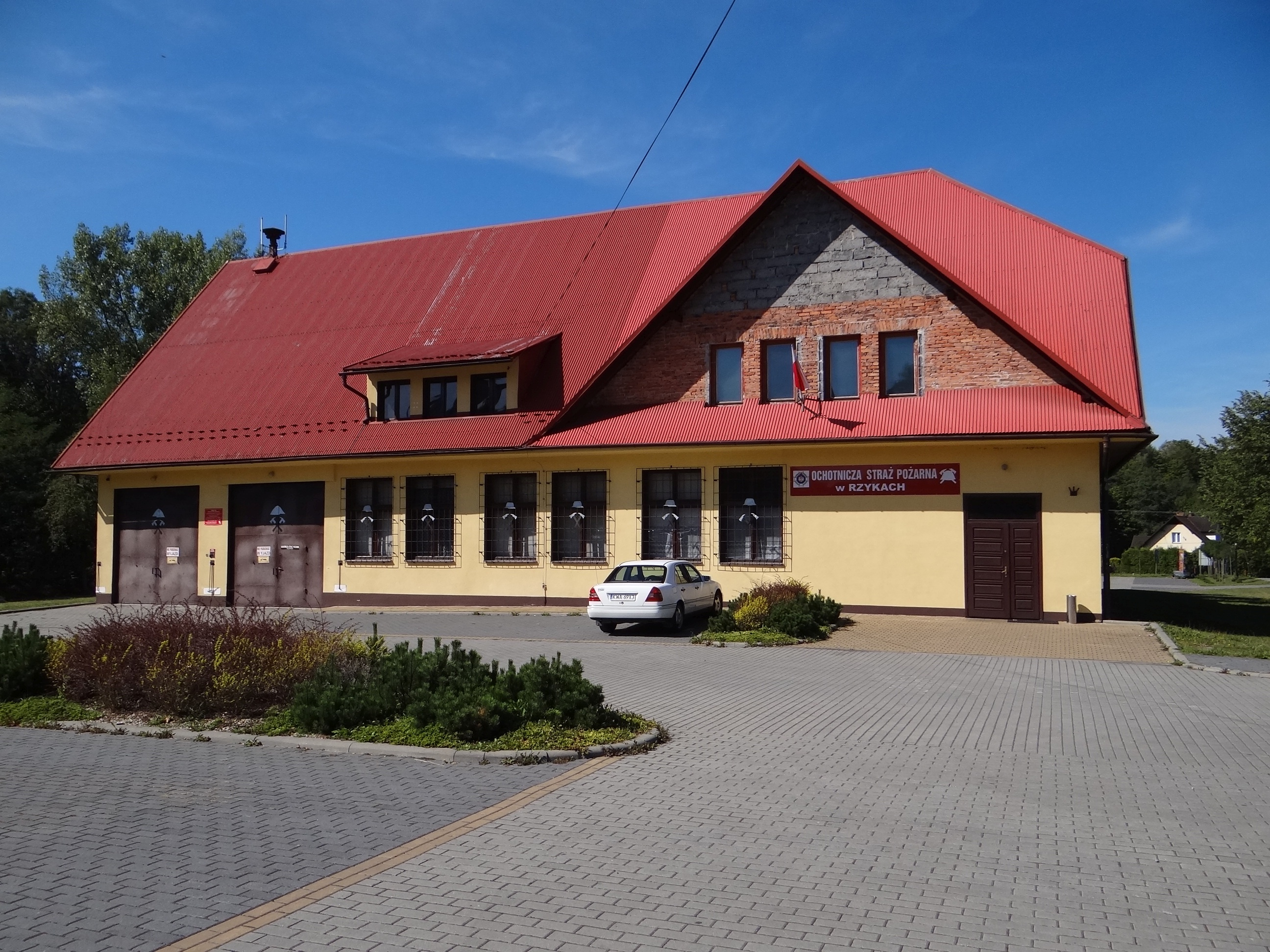 Remiza OSP w Rzykach